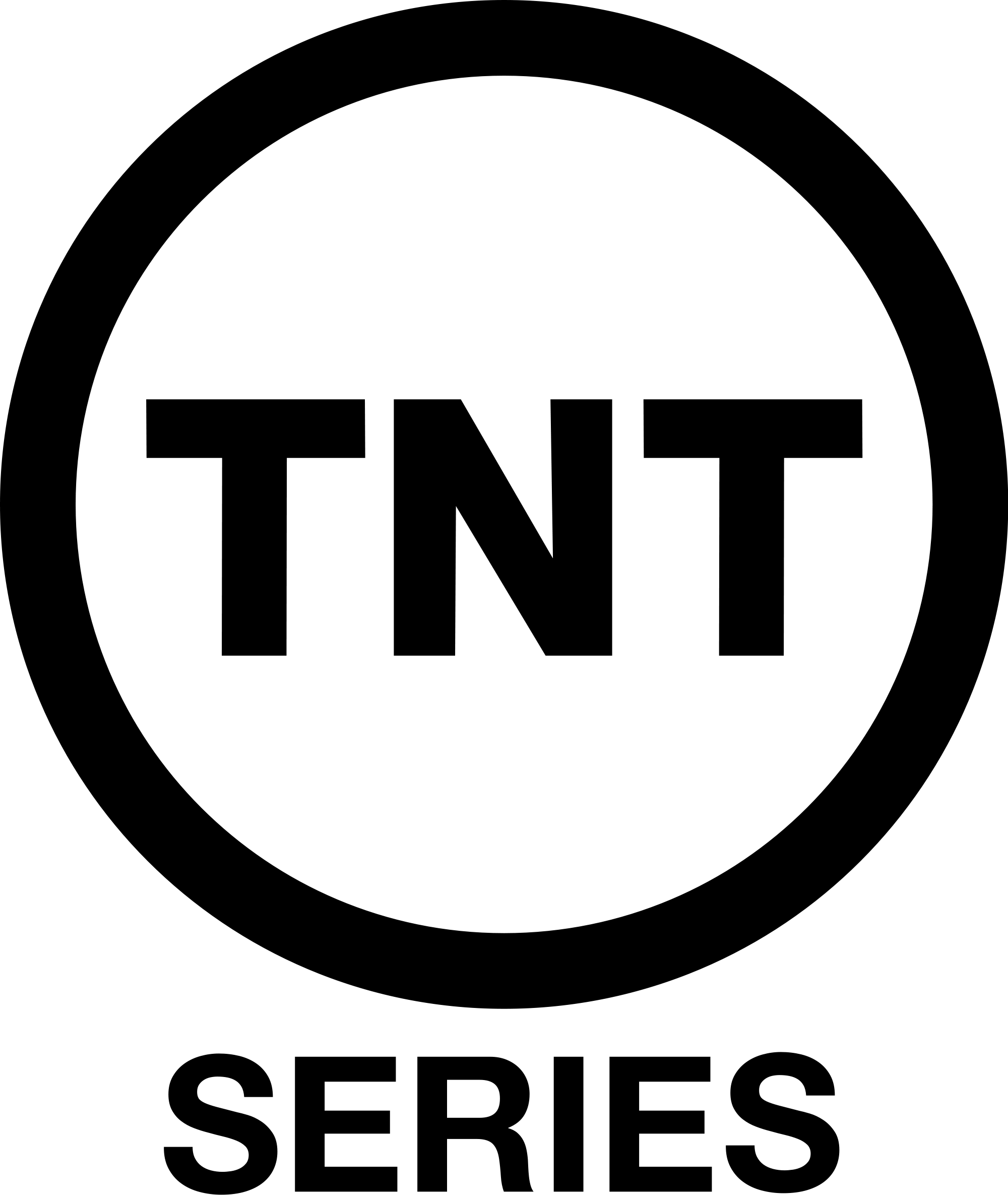 Logotipo de TNT Series.